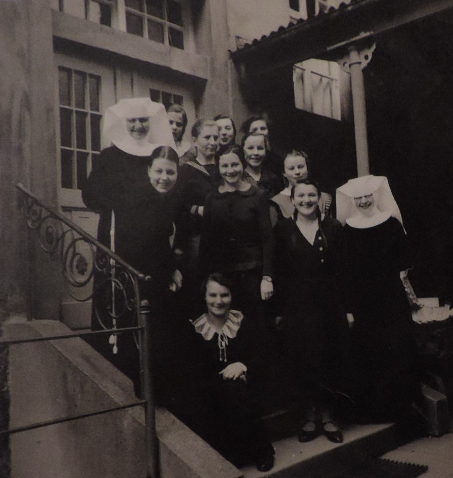 Seminaristinnen des Nördlinger Kindergärtnerinnenseminars ca. 1930